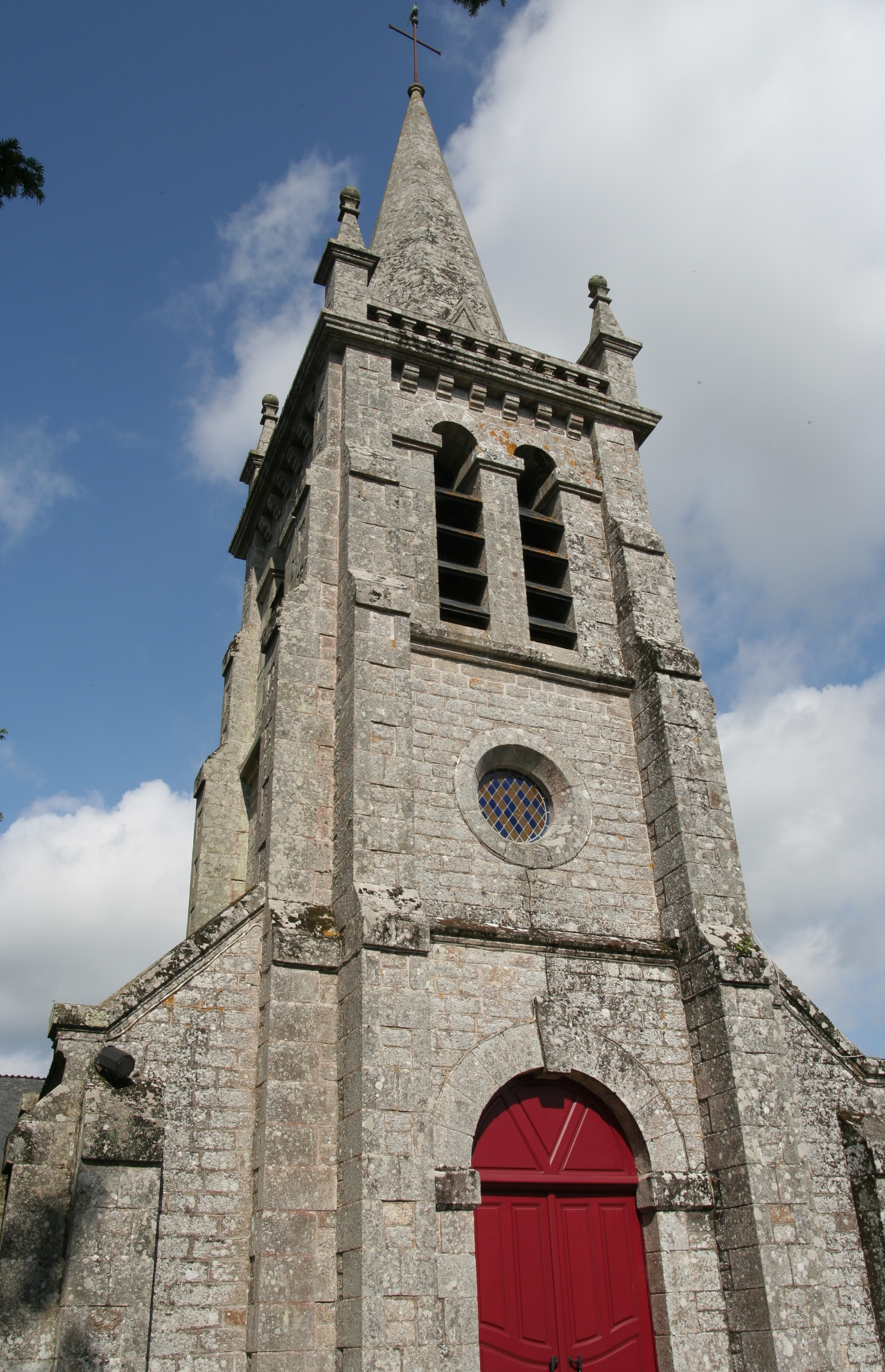 Église Saint-Gildas de Bohal